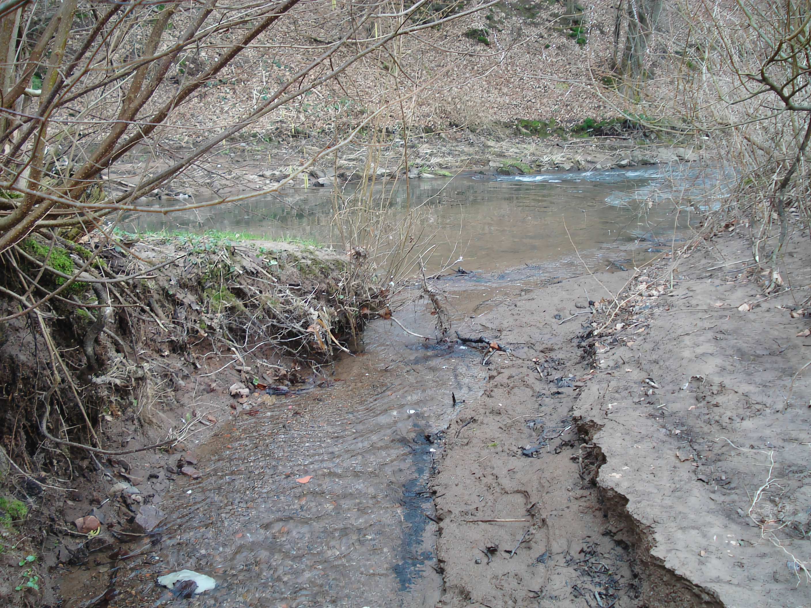 Der Steinbach mündet in die Kahl